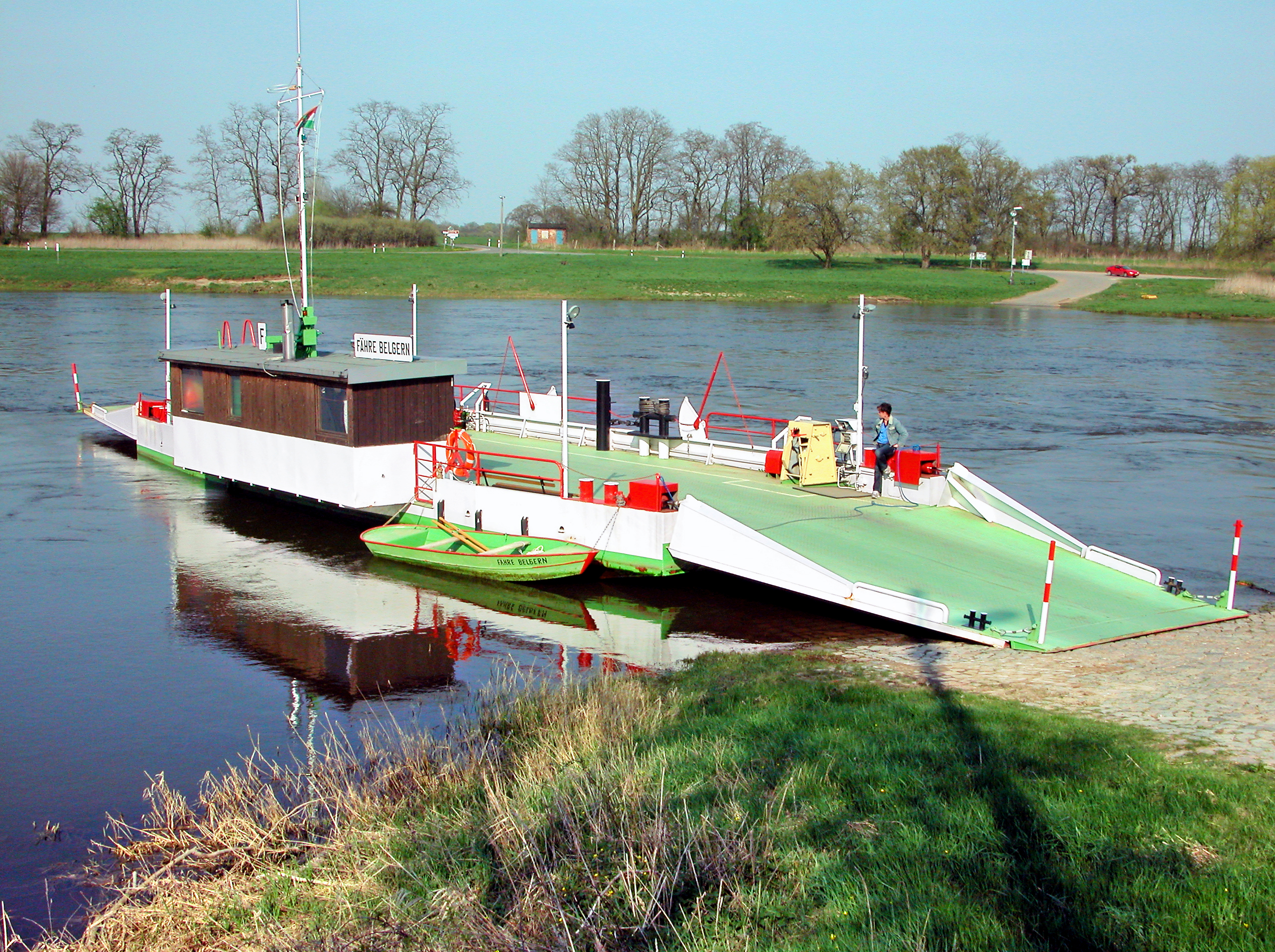 10.04.2009 04874 Belgern (Belgern-Schildau), An der Elbe (GMP: 51.484563,13.132094): Fähre Belgern. Autofähre, Gierfähre über die Elbe. Als Fähre im 13. Jahrhundert erstmals erwähnt. Neubau 1992. [DSCN36242.TIF]20090410740DR.JPG(c)Blobelt